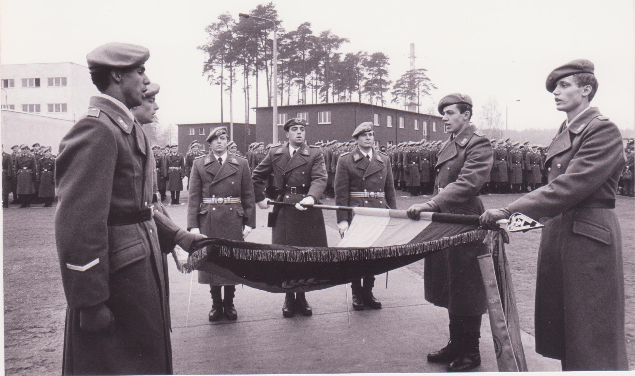 Vereidigung von Soldaten des Luftsturmregiment 40 in Lehnin